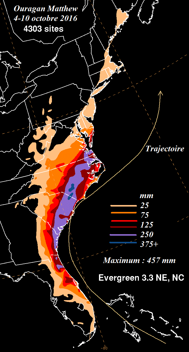 Accumulations totales de pluie avec l'Ouragan Matthew de 2016 sur la côte est des États-Unis.